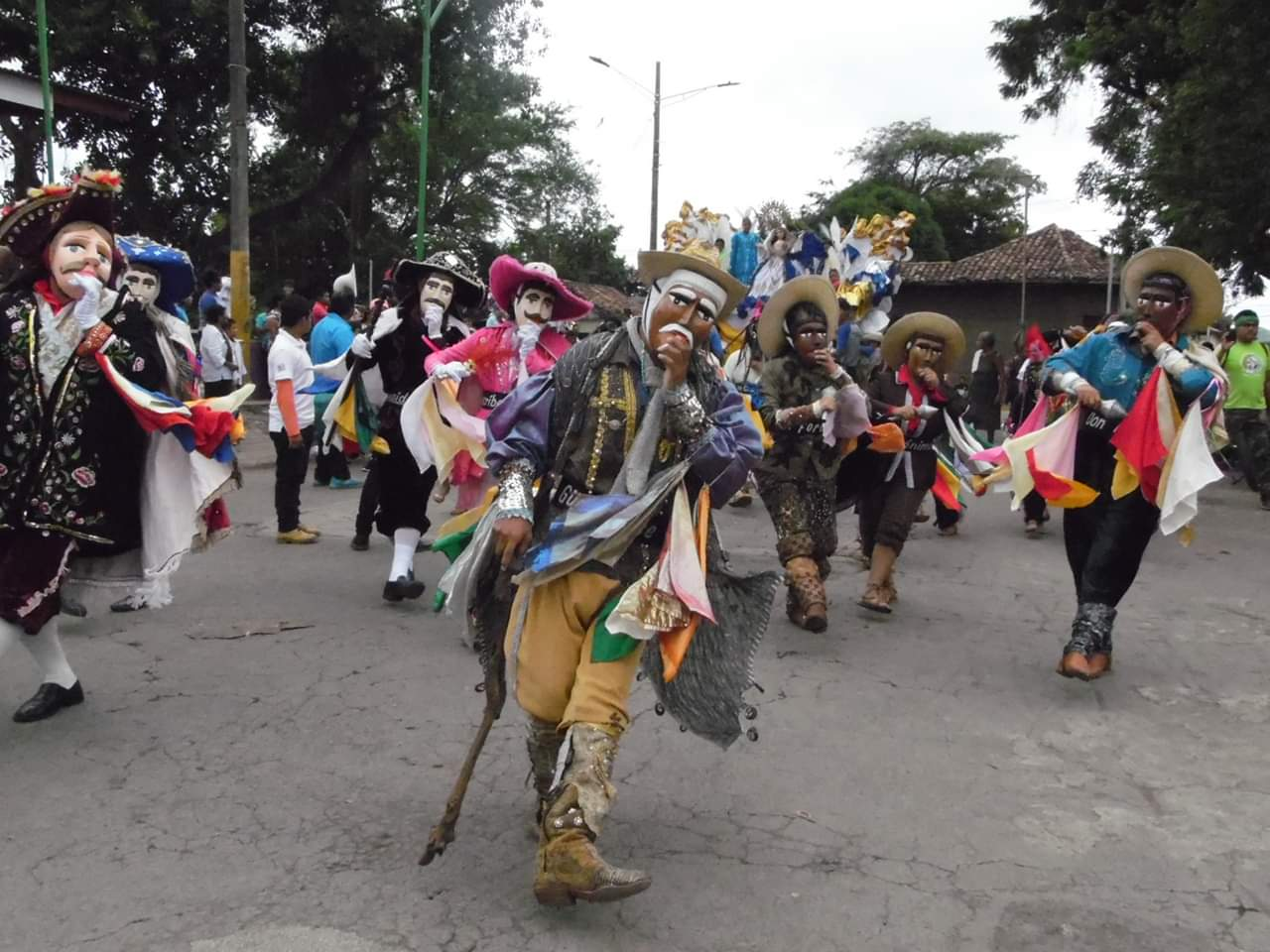 Original del Güegüense